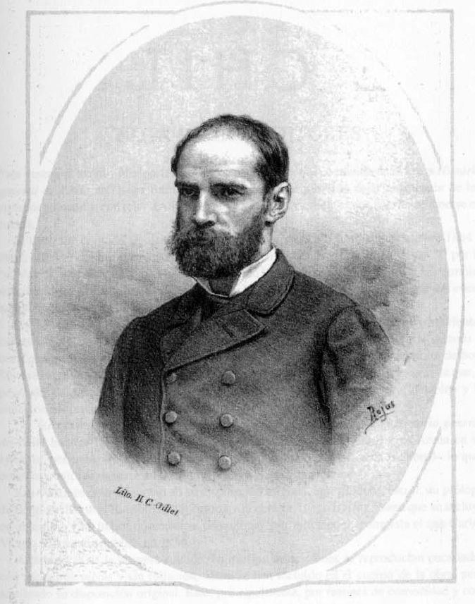 Diego Jacinto Agustín Barros Arana (Santiago, 16 de agosto de 1830 - Santiago, 4 de noviembre de 1907) pedagogo, diplomático e historiador chileno del siglo XIX.